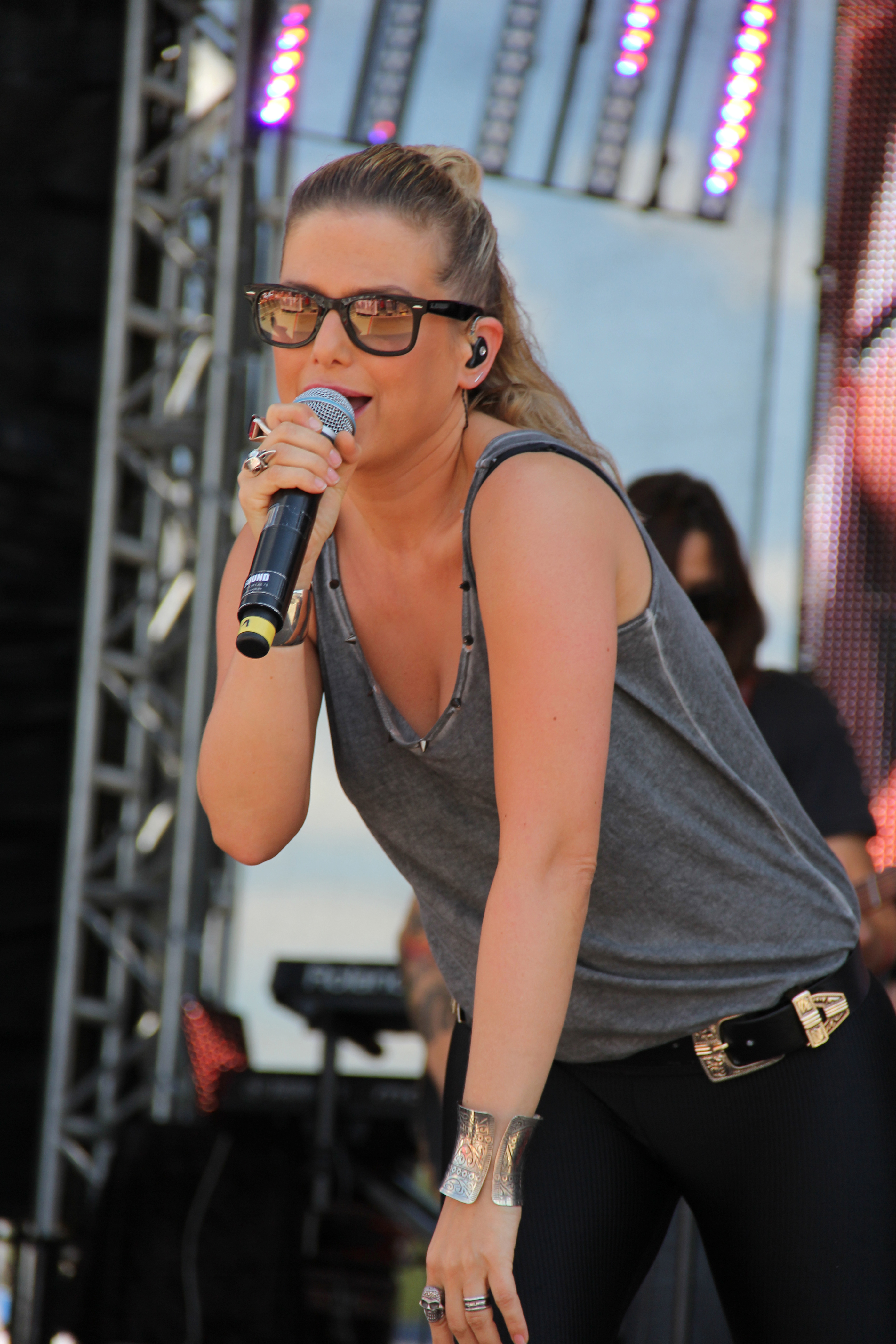 Jeanette Biedermann tritt mit ihrer Band Ewig bei REWE Family am 09.07.2016 auf dem Cannstatter Wasen in Stuttgart auf.